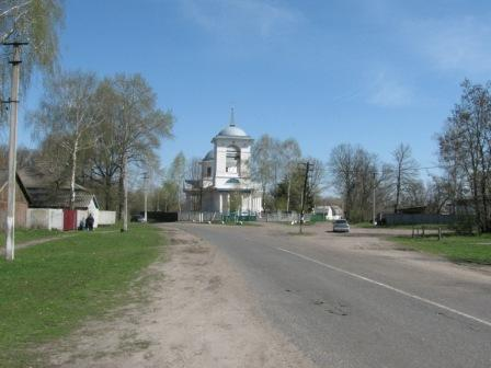 Въезд в село Безугловка со стороны Нежина